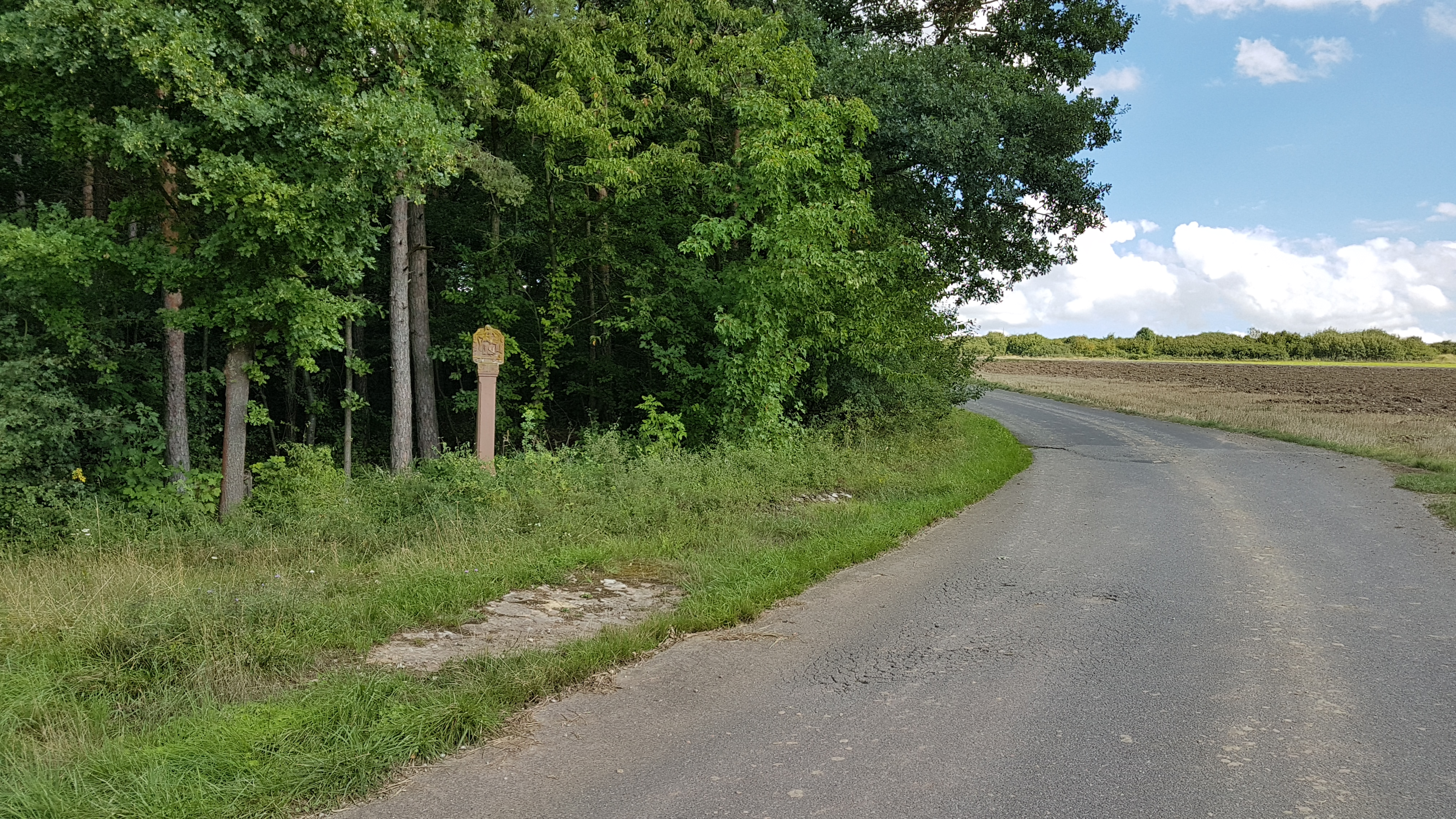 Nr. 11 der in der Dittwarer Ortschronik beschriebenen Bildstöcke und Denkmäler (siehe: Ortschronik). Diese Pieta-Darstellung befindet sich am kleinen Wäldchen an der Steige (im Dittwarer Dialekt "Staach") links vor der Autobahn. Sie wurde 1732 von Hans Martin Both errichtet (siehe Bildstockinschrift). Drei weitere Pieta-Darstellungen auf der Dittwarer Gemarkung stammen vermutlich alle aus einer Bildhauerwerkstatt Buscher in Gamburg. Siehe auch: HKV Dittwar, Pieta Darstellungen.